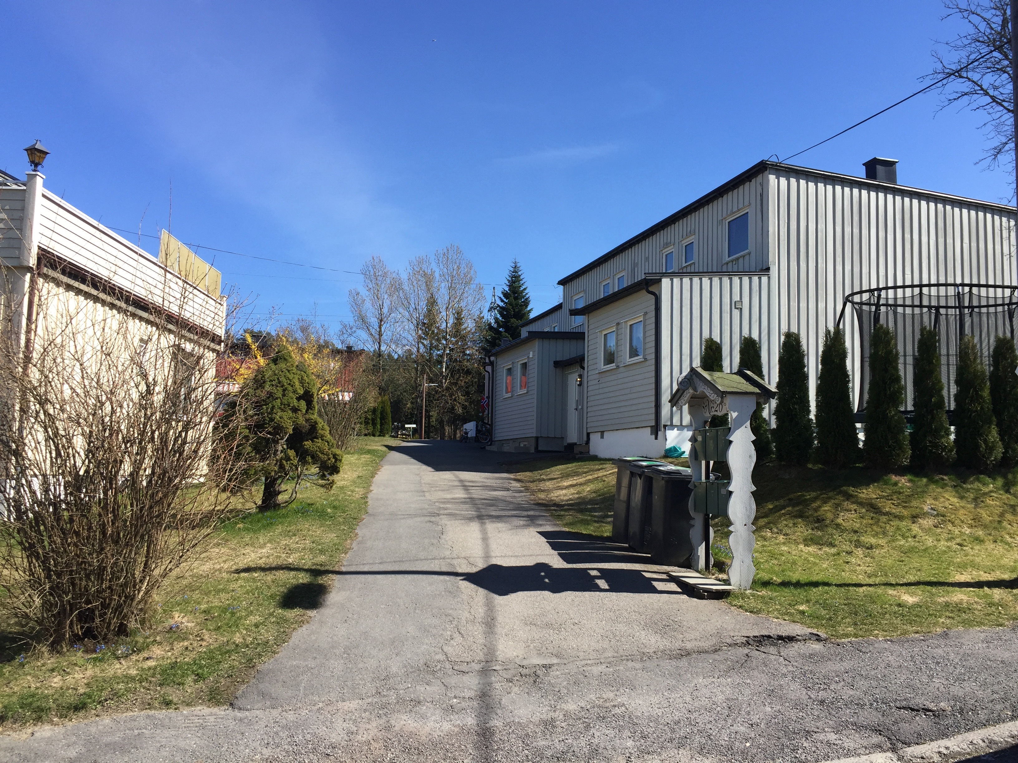 Skuronnveien i Oslo.